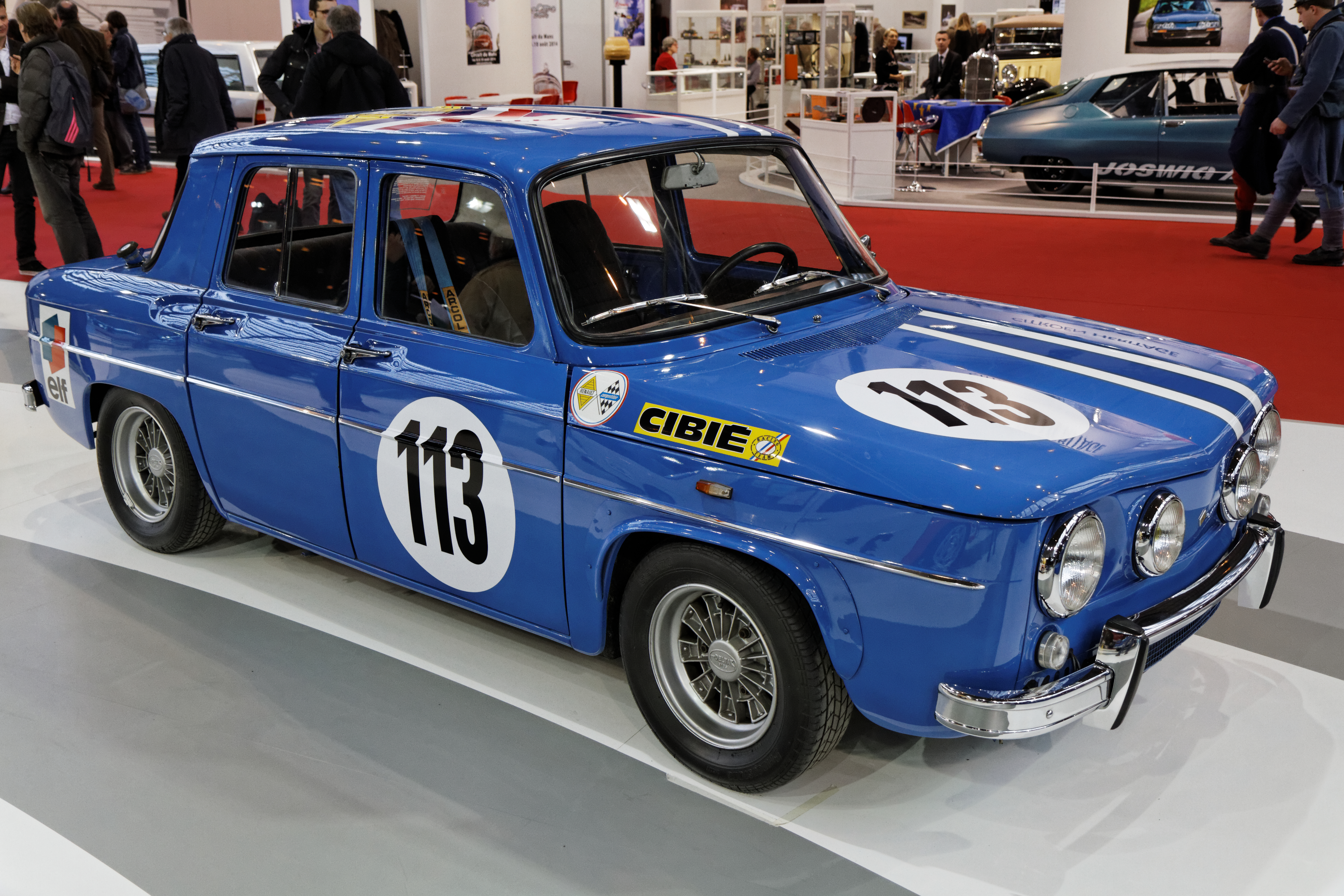 Une Renault 8 Gordini double arbre présentée lors du salon Retromobile 2014.